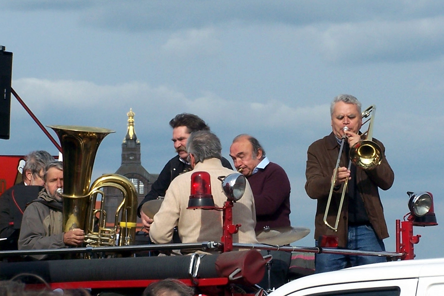 Blue Wonder Jazzband bei der Abschlussparade des Internationalen Dixielandfestivals Dresdens 2010